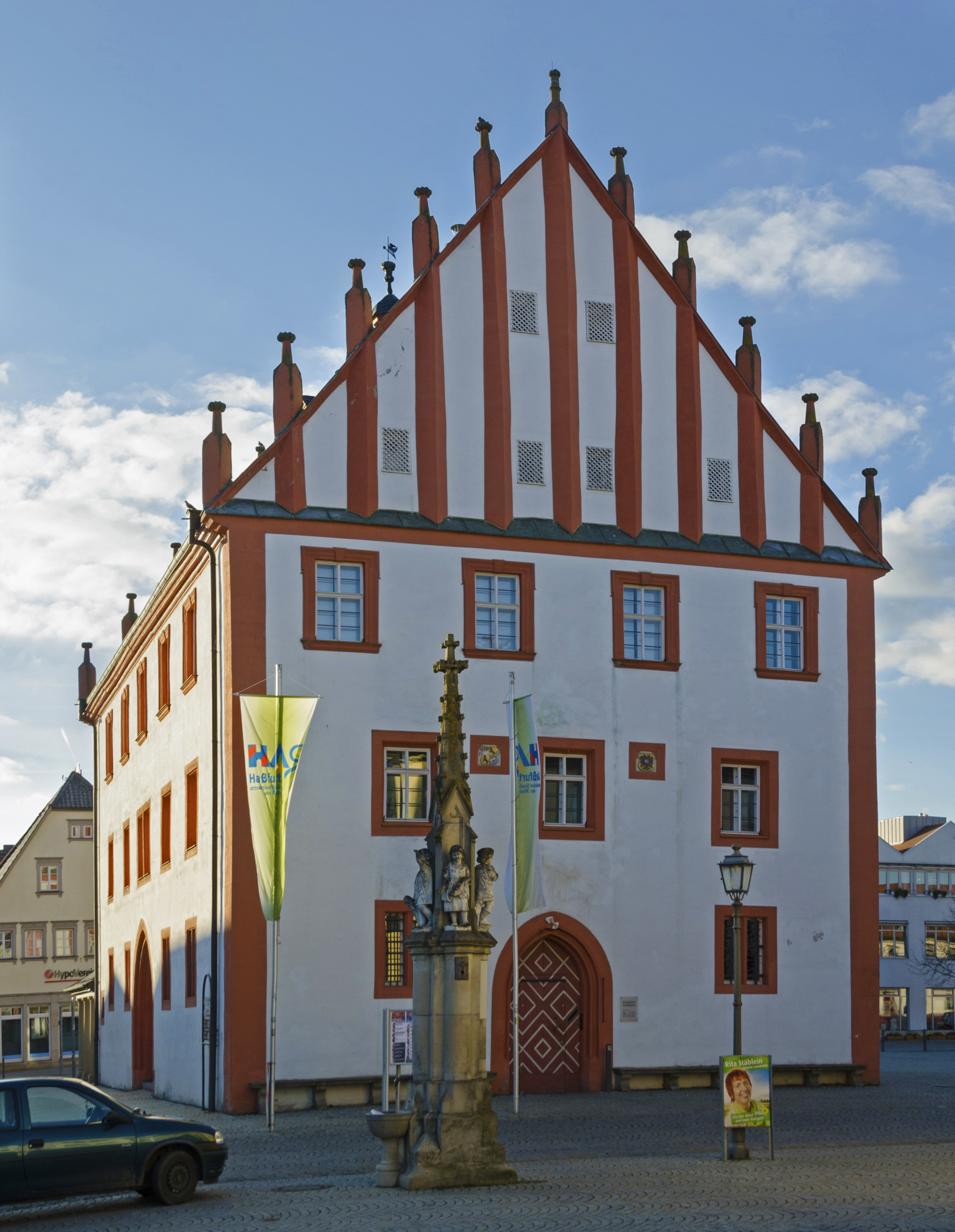 Haßfurt, Marktplatz 1, Rathaus